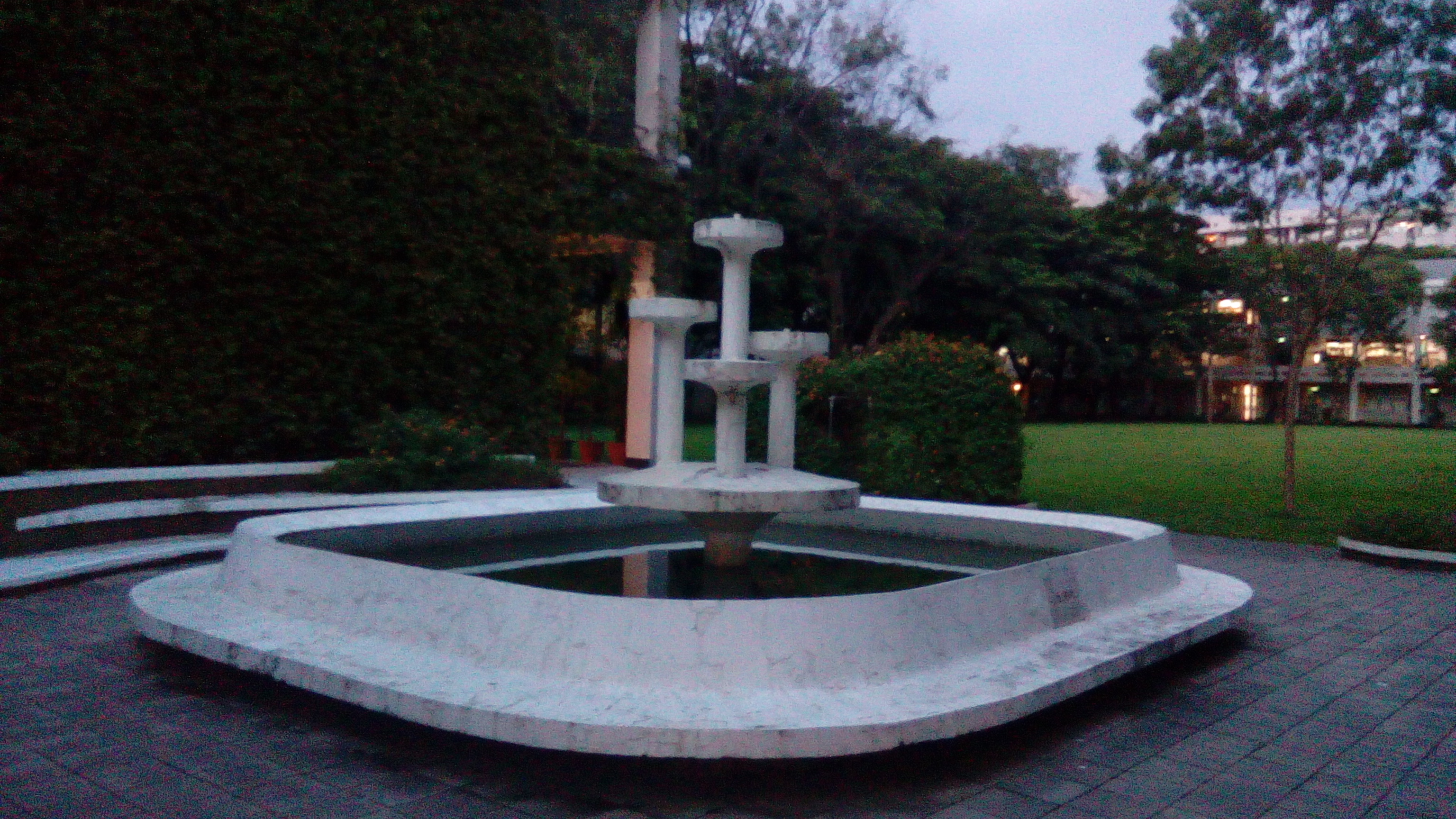 位於南應文創產品展售行旁